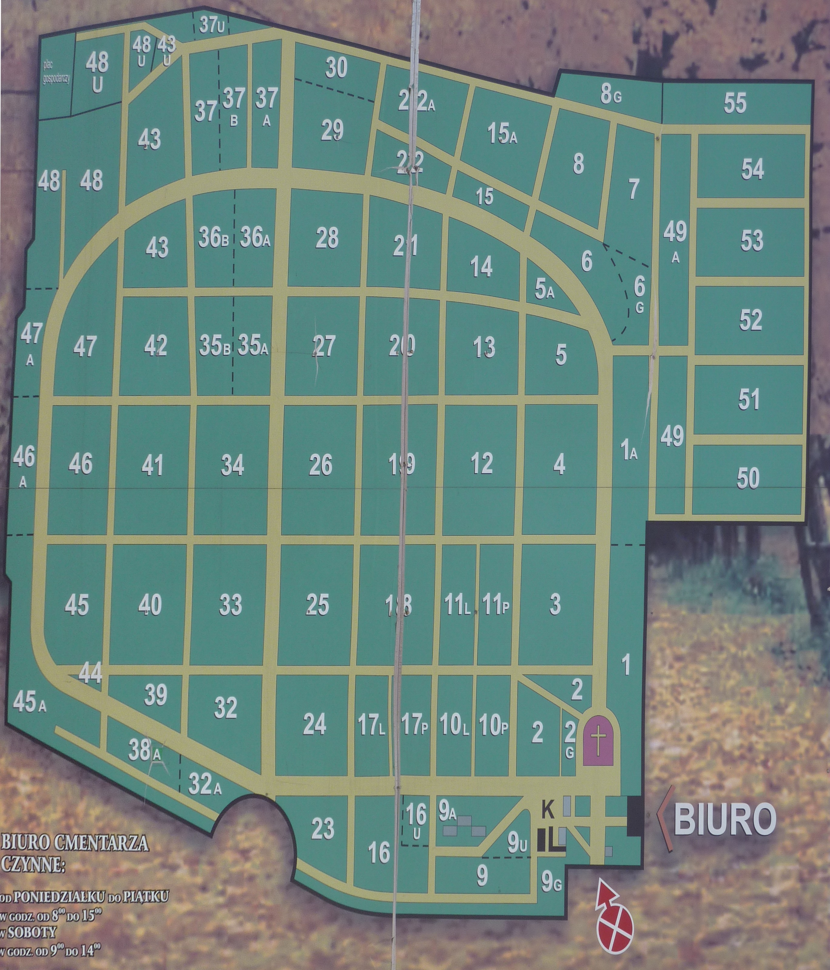 Cmentarz Grabiszyński we Wrocławiu: tablica przy wejściu głównym